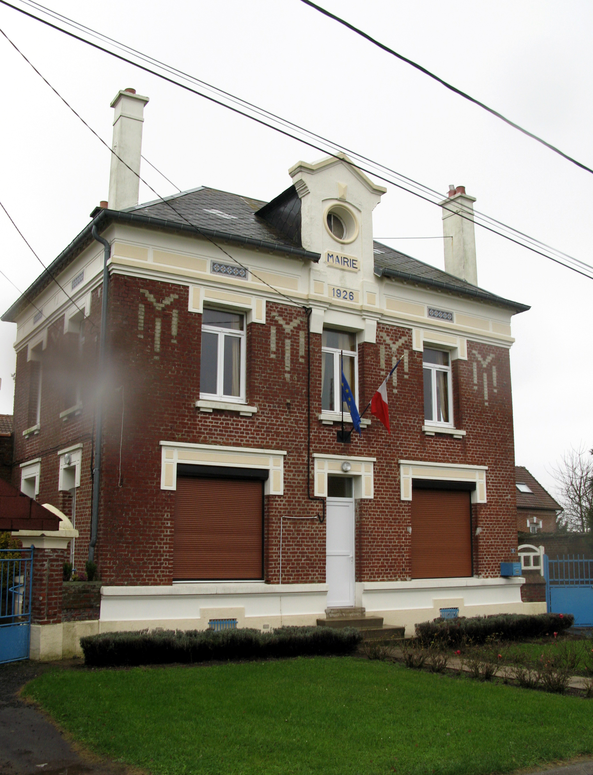 Gueudecourt (Somme, France) - La mairie dont la reconstruction est achevée en 1926, après sa destruction liée à la Première Guerre mondiale (presque en face du monument aux morts sur la place de l'ancienne église). La photo a été prise sous la pluie, ce qui explique le flou sur de nombreuses zones de l'image, dû aux gouttes sur l'objectif.